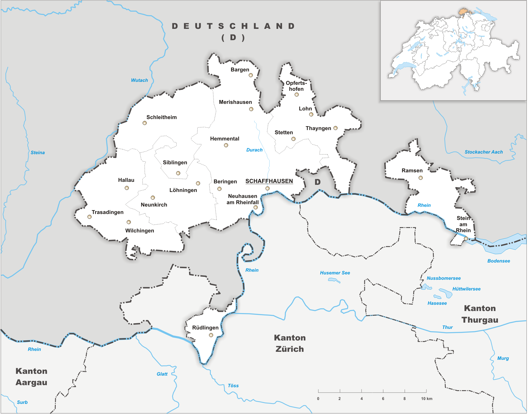 Karte des Kanton Schaffhausen.